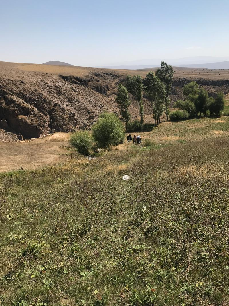 روستای سرخاب، نیر، اردبیل